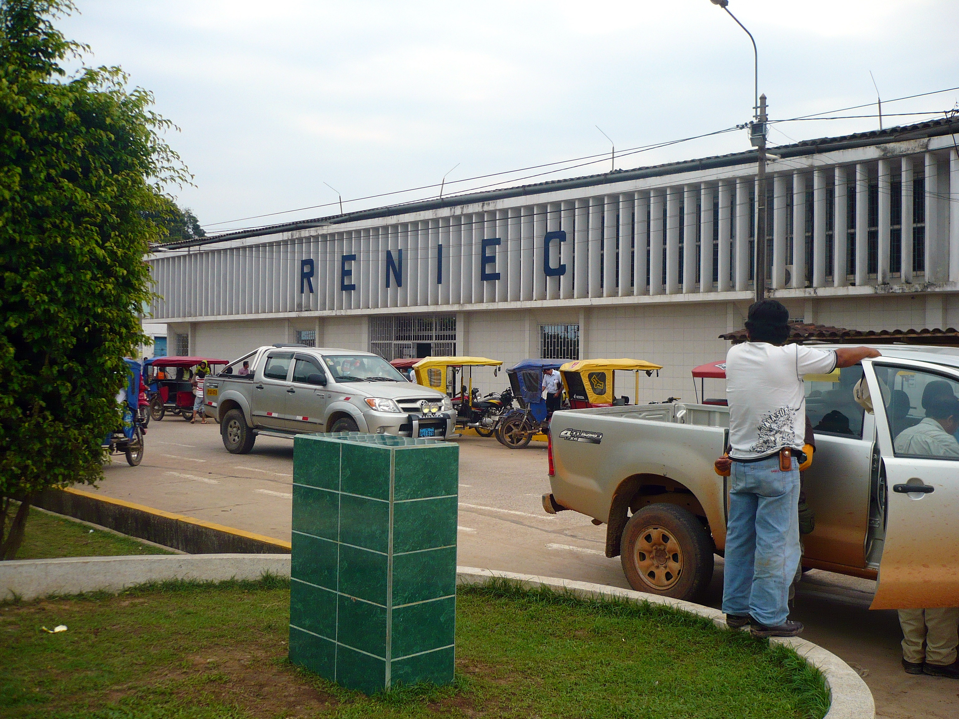 Sede de la RENIEC en Pucallpa.